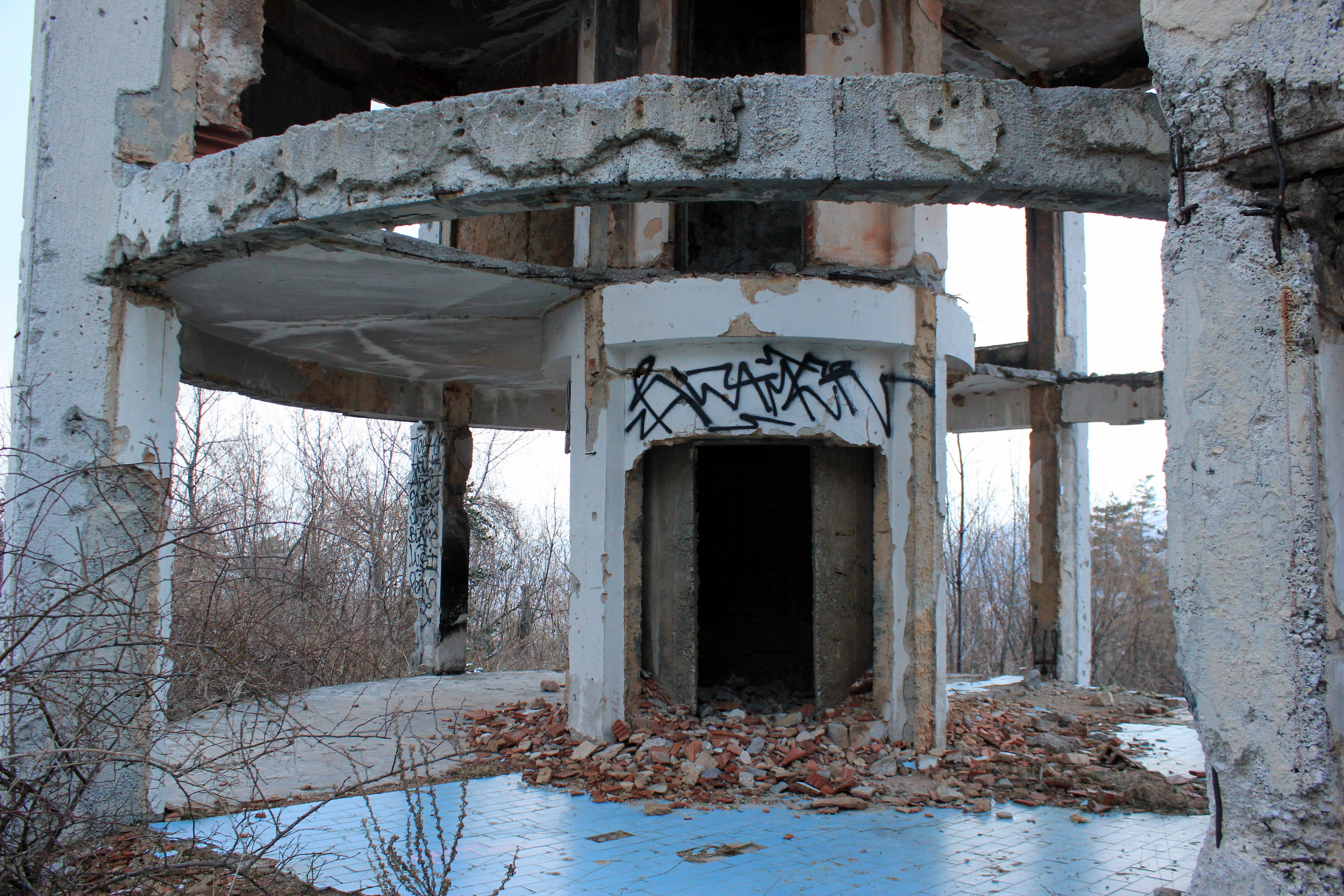 Die Ruine des ehemaligen Observatoriums Bistrik kula an den Hängen des Trebević oberhalb von Sarajevo.